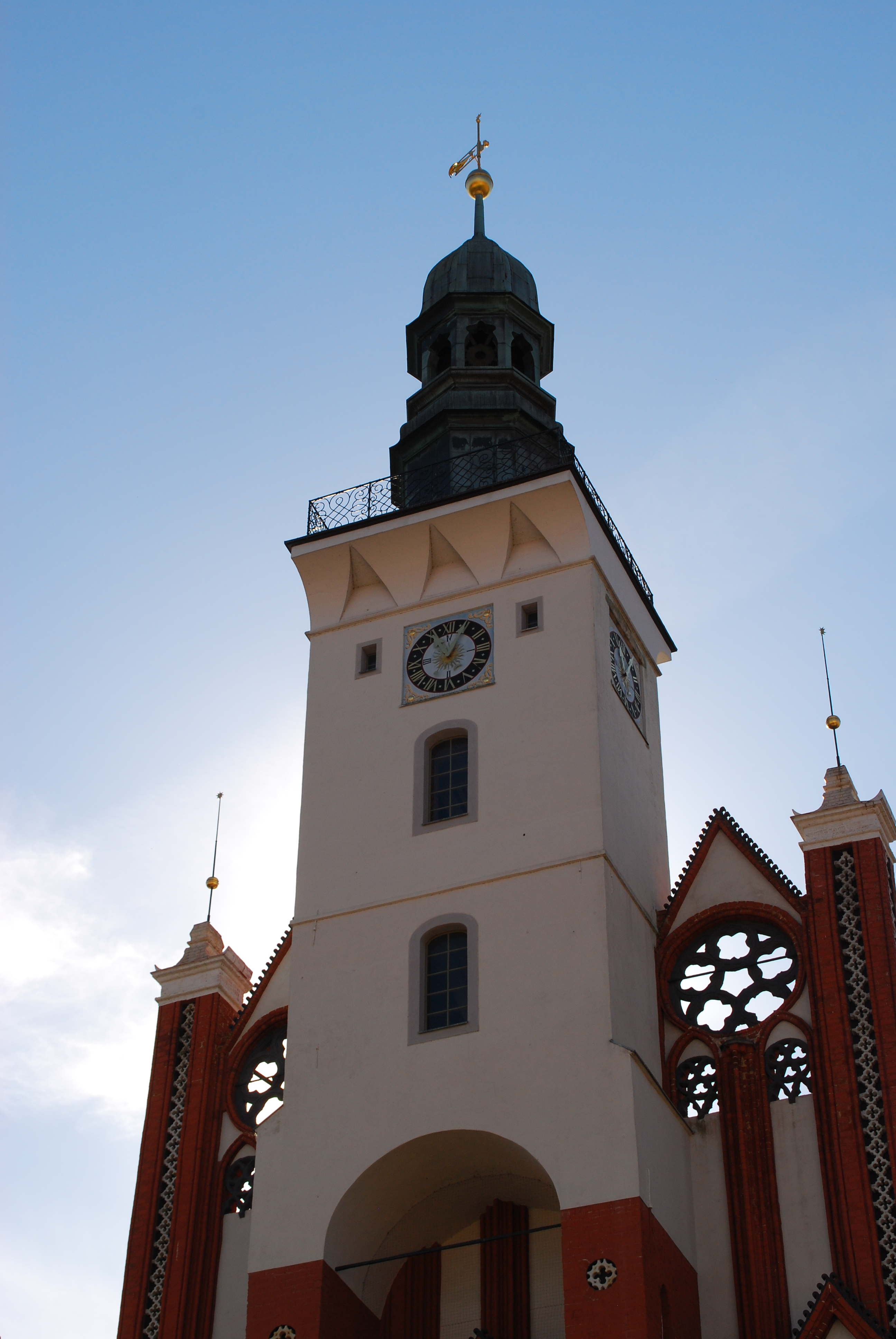 Rathaus Frankfurt (Oder), Turm